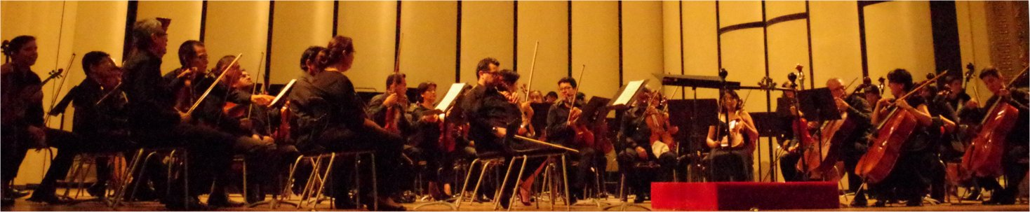 Orquesta Sinfónica Nacional Del Perú - sin director